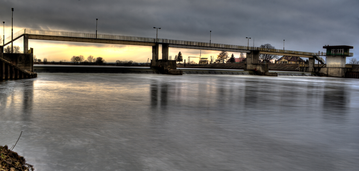 śluza znajdująca się na rzece Odra nieopodal miejscowości Kąty Opolskie.